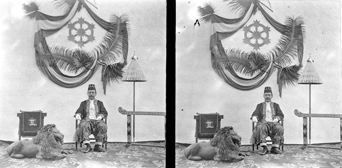 Negatief. Portret van R.R.A. Tjakraningrat, Regent van Bangkalan